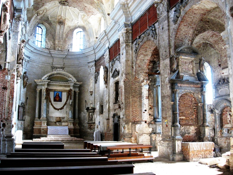 Головний неф колегіати в Олиці